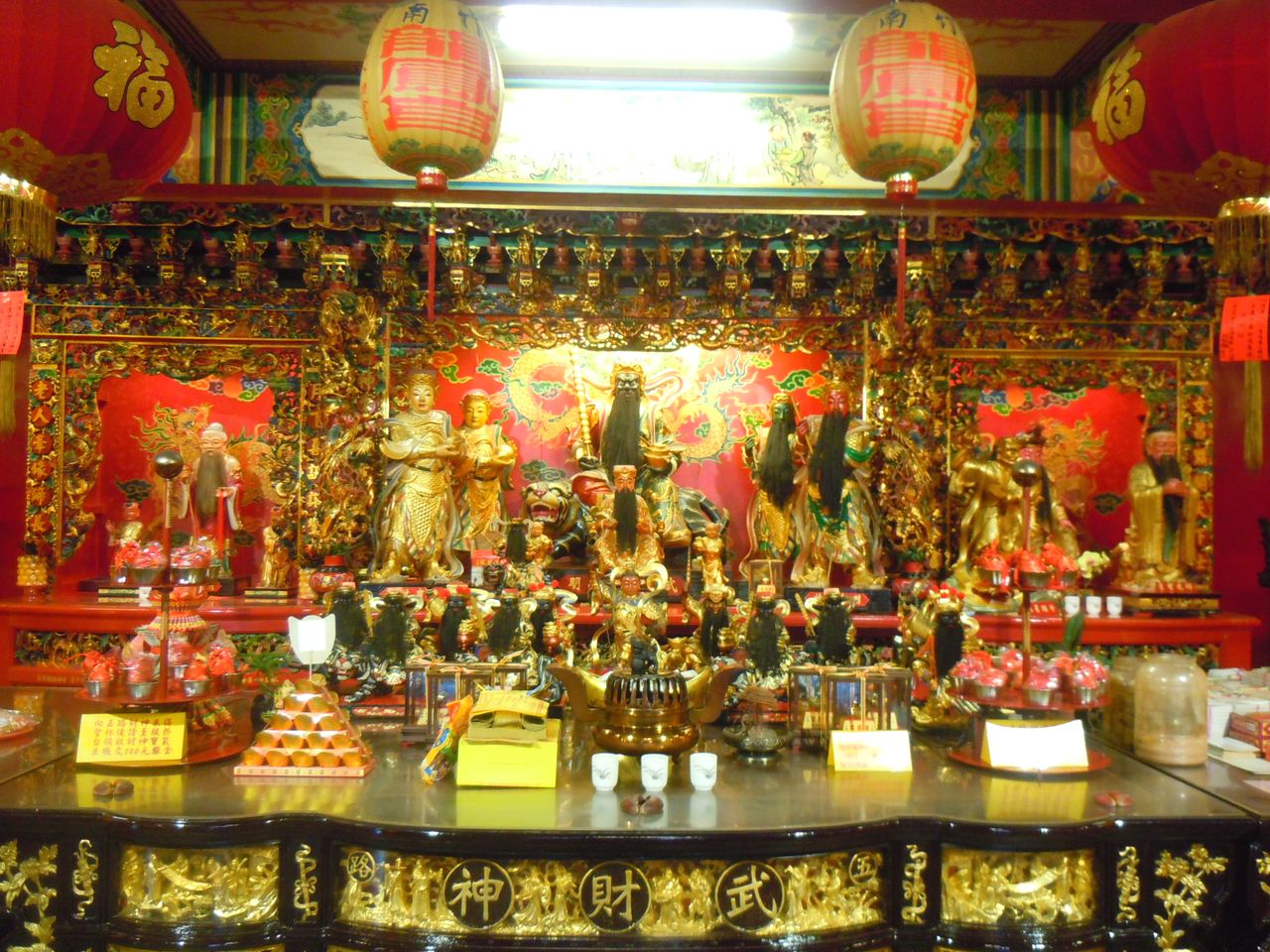 中文（台灣）: 竹南后厝龍鳳宮武財神。